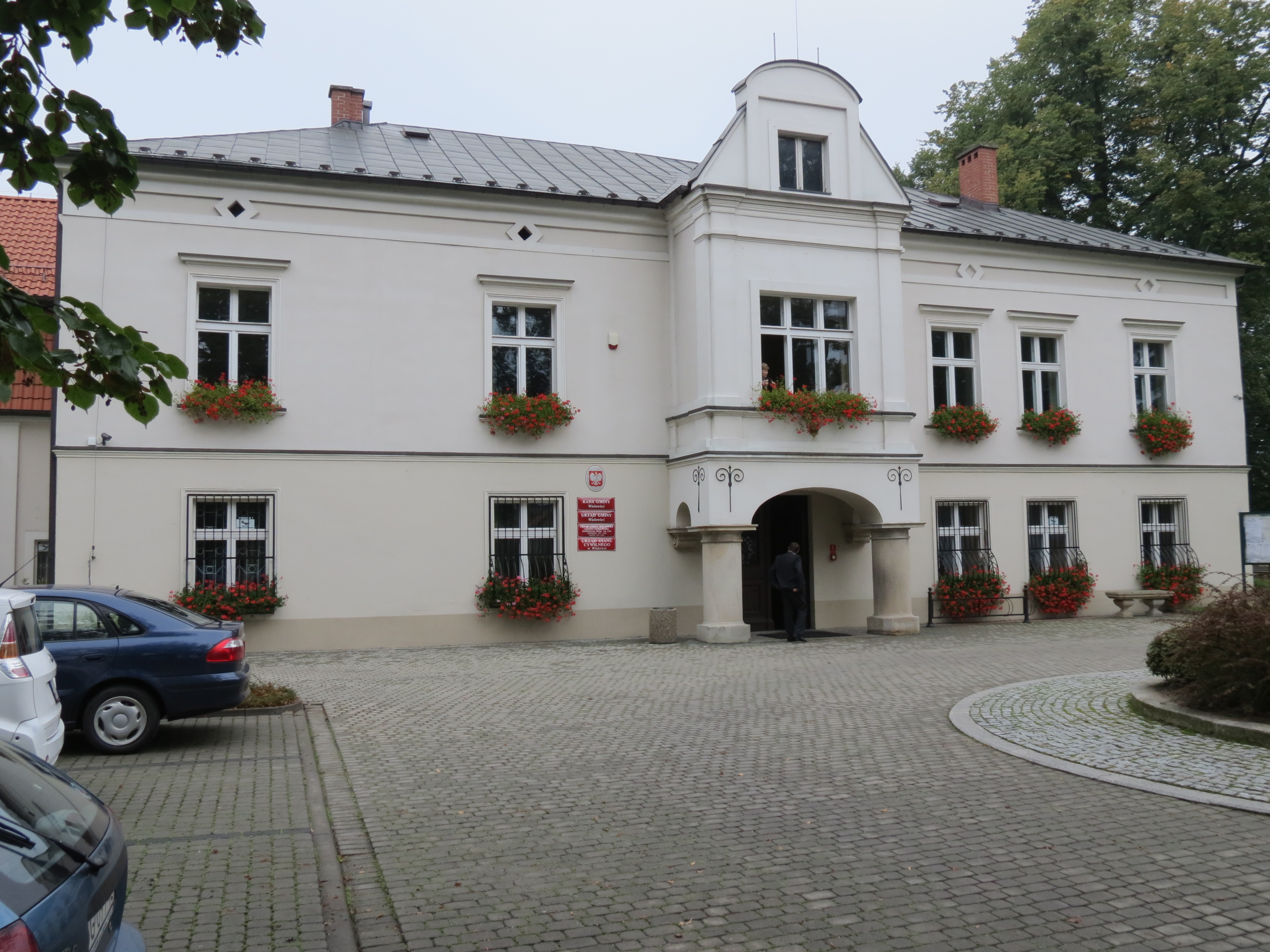 Wielowieś, dwór, 1748, 1923, 1947